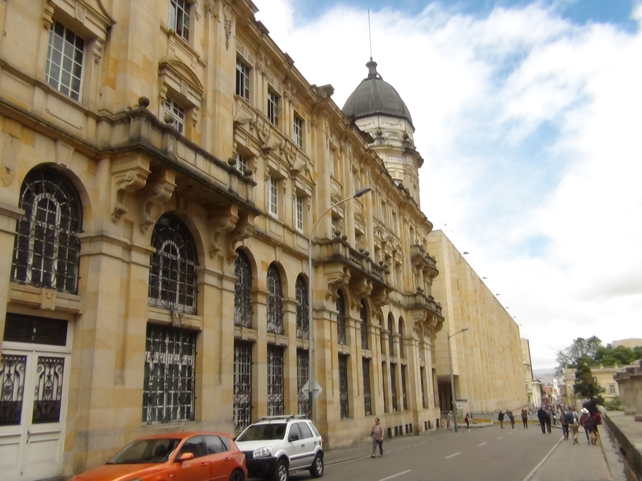 Colegio Mayor de San Bartolomé costado sobre la Carrera 7ª, sobresale el Torreón de la Bandera.